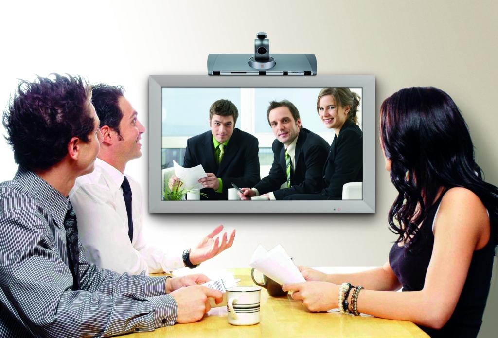 видеоконференция на базе группового терминала Aethra Vega X5